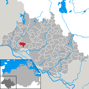 Dersenow in Mecklenburg-Vorpommern - district Ludwigslust